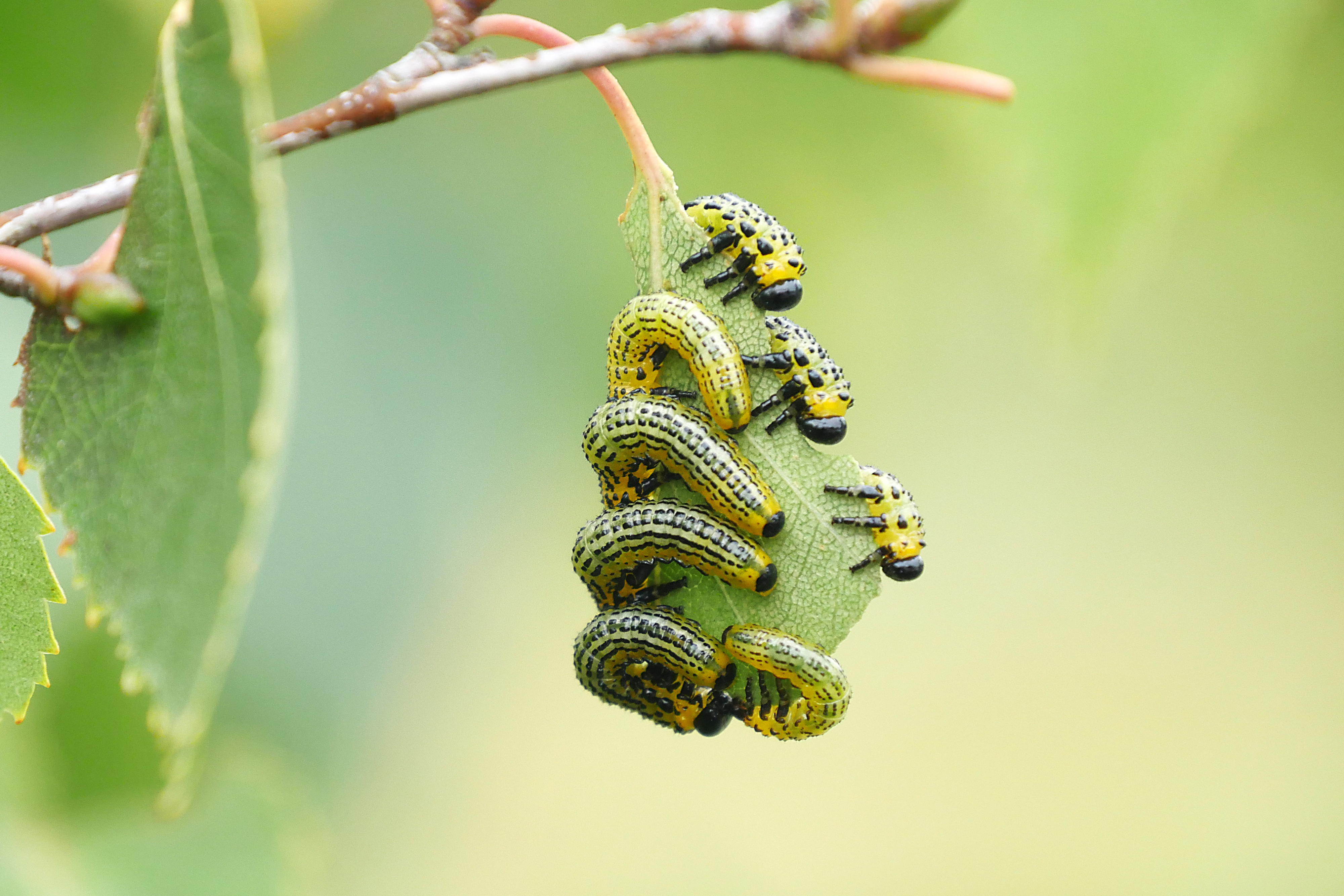 Larv av blåsvart björkstekel (Arge pullata).